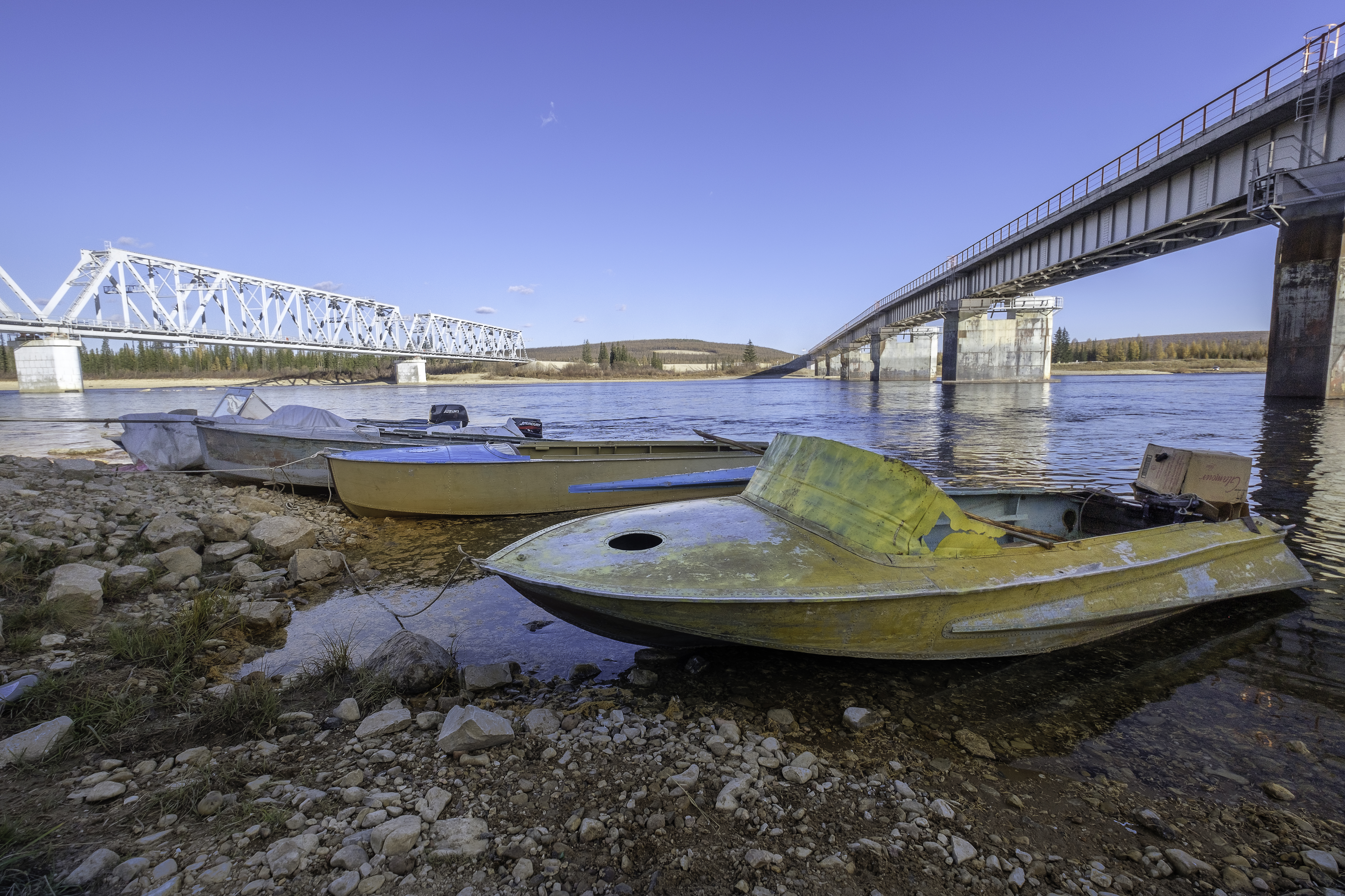 Spoorbrug (links) en wegbrug (rechts) over de Amga bij Verchnjaja Amga. De spoorbrug is onderdeel van de Spoorlijn Amoer-Jakoetsk.